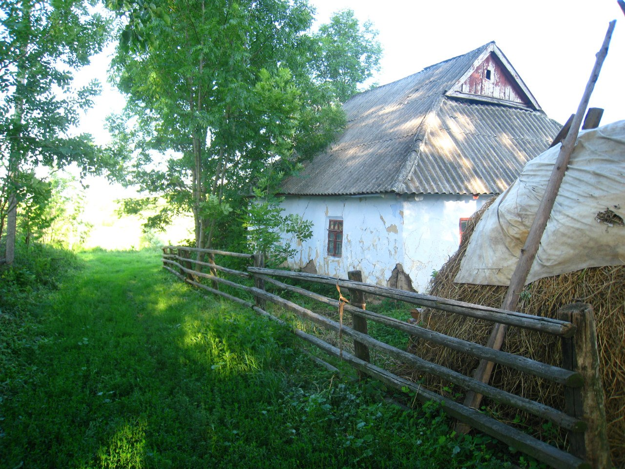 сільска вуличка